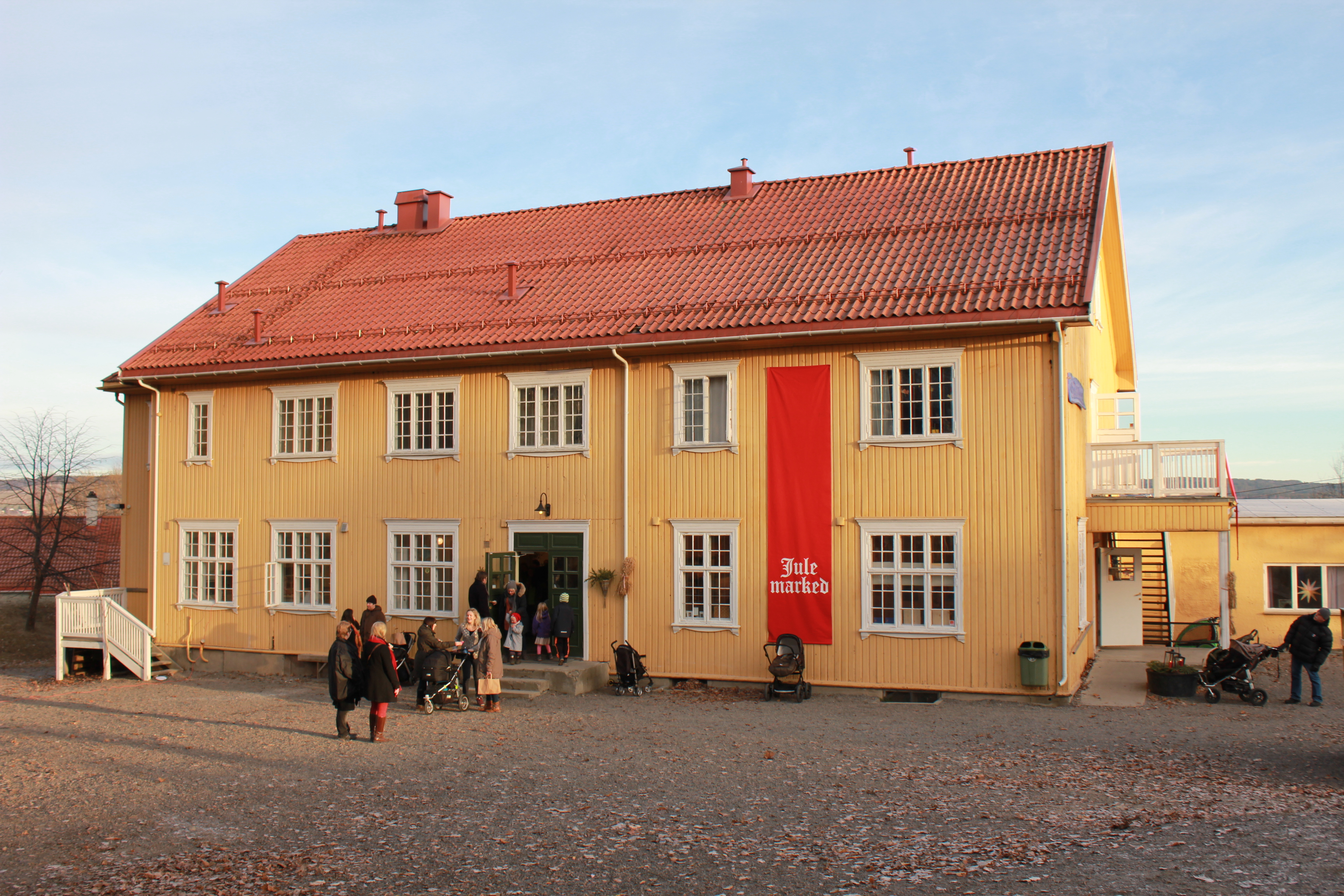 Steinerskolen på Gjøvik.